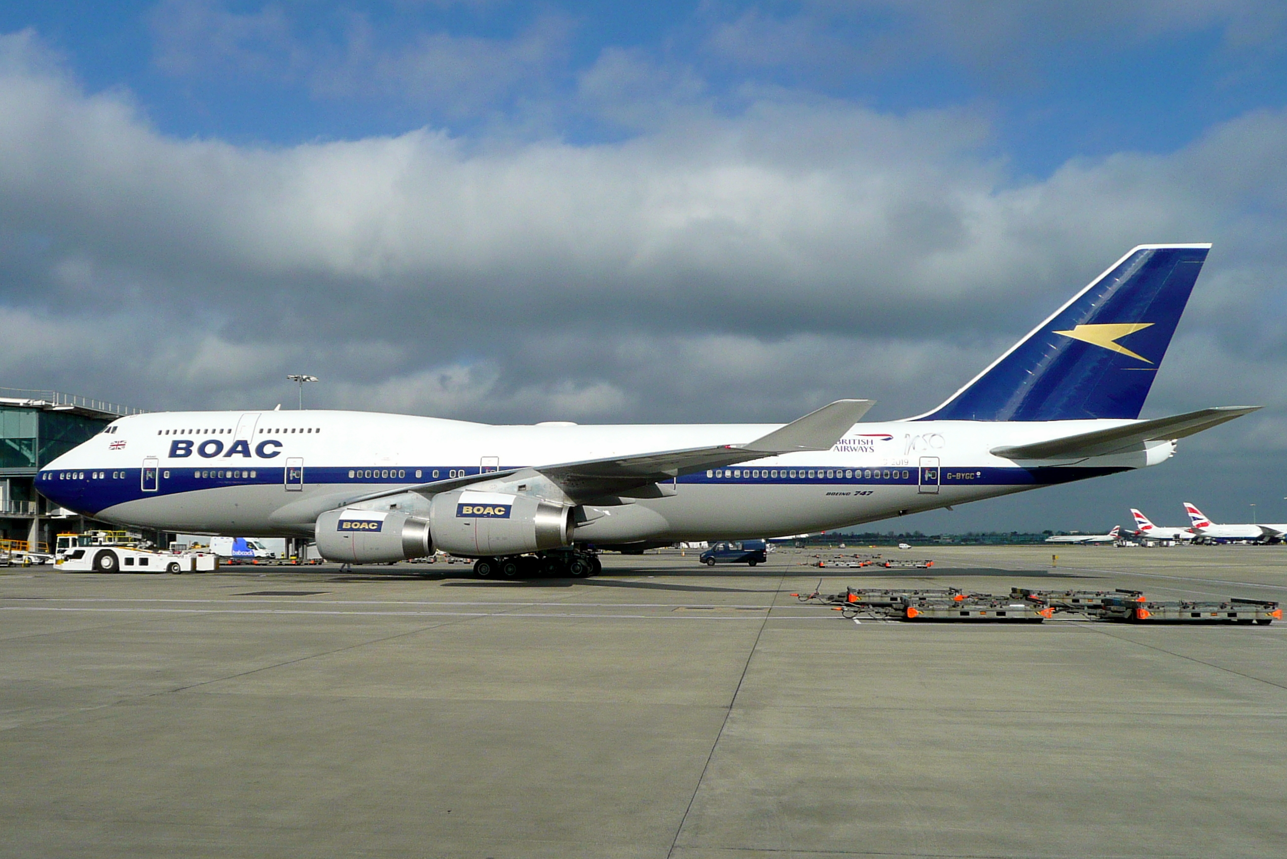 G-BYGC 21022019LHR